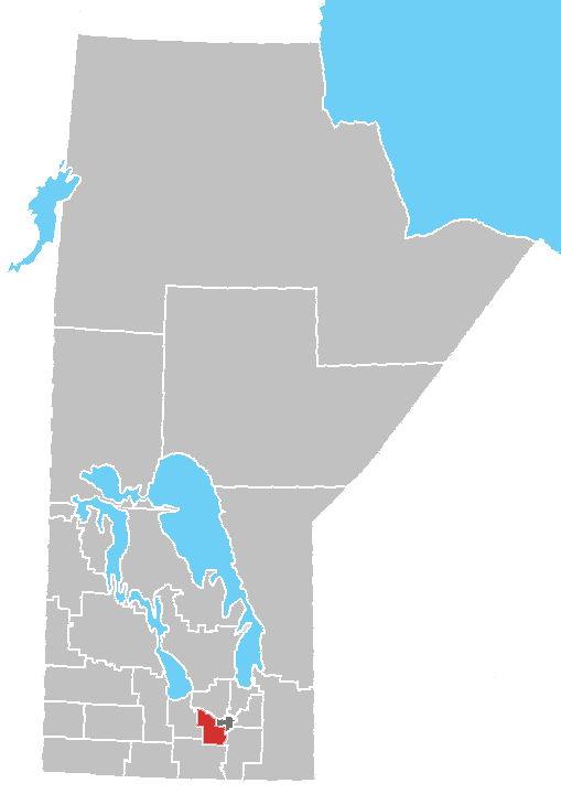 Manitoba census area No. 10